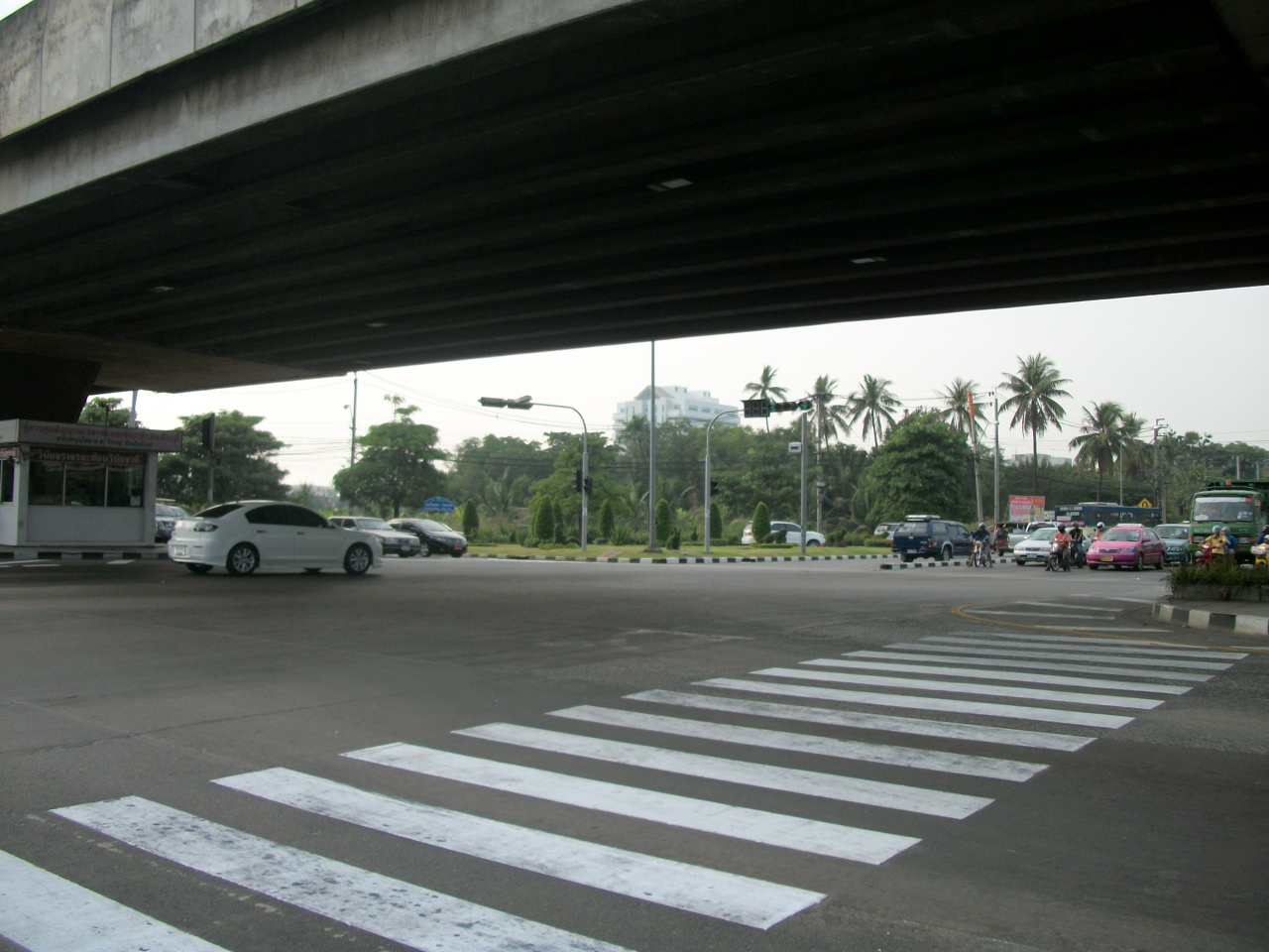 แยก รามคำแหง+ร่มเกล้า